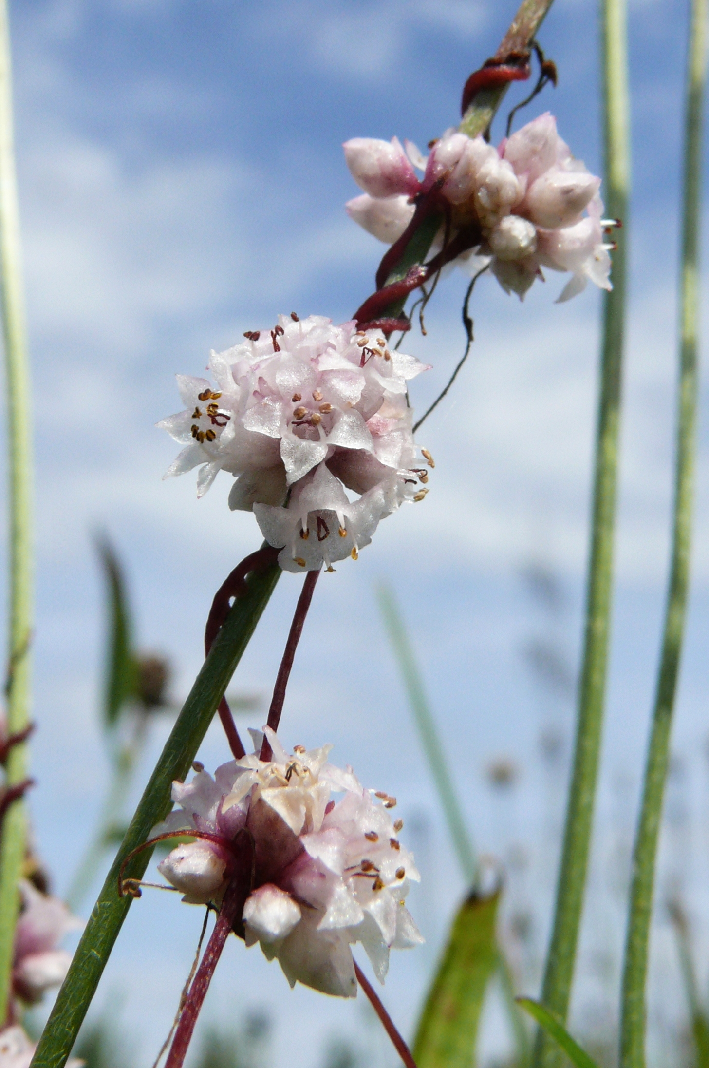 Cuscuta epithymum, Schwäbisch-Fränkische Waldberge, Deutschland